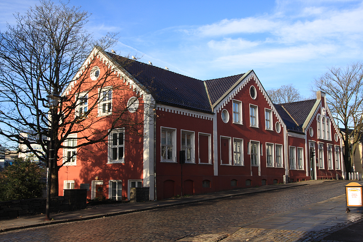 Kongsgata 47-49